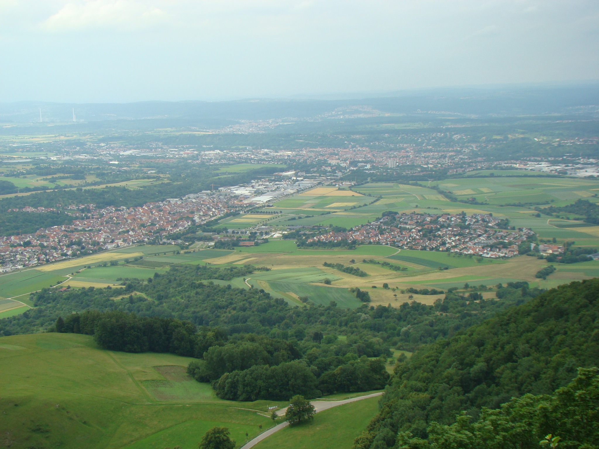 Blick von der Teck auf Dettingen unter Teck und Kirchheim